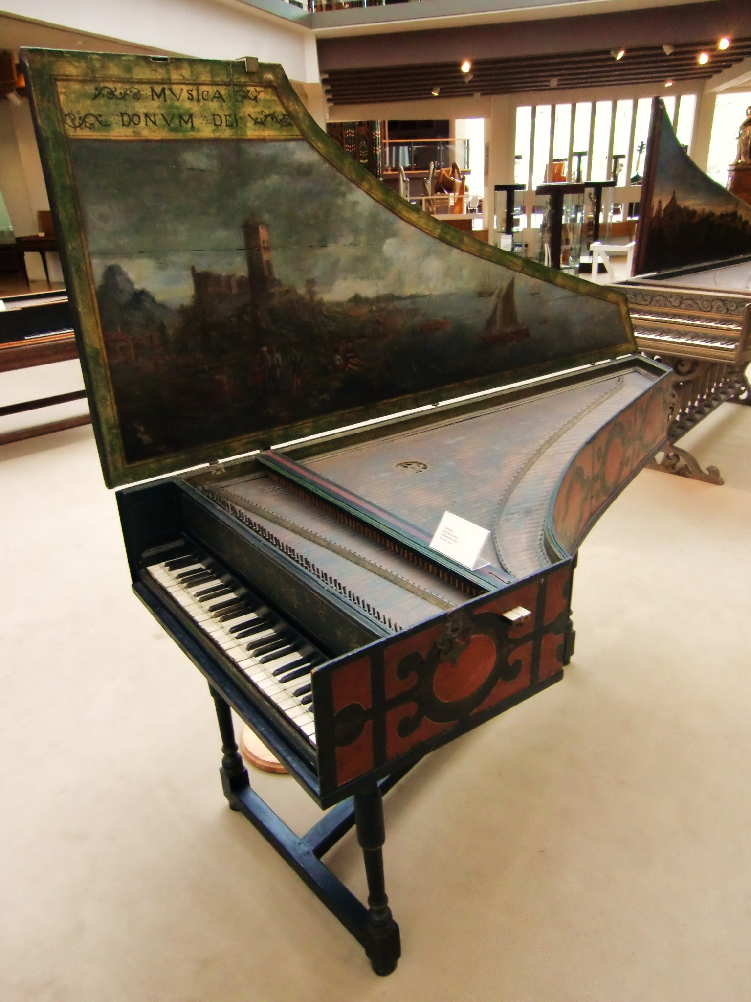 Clavecin de Ioannes Ruckers (Anvers 1627) - Berlin, Musikinstrumentenmuseum